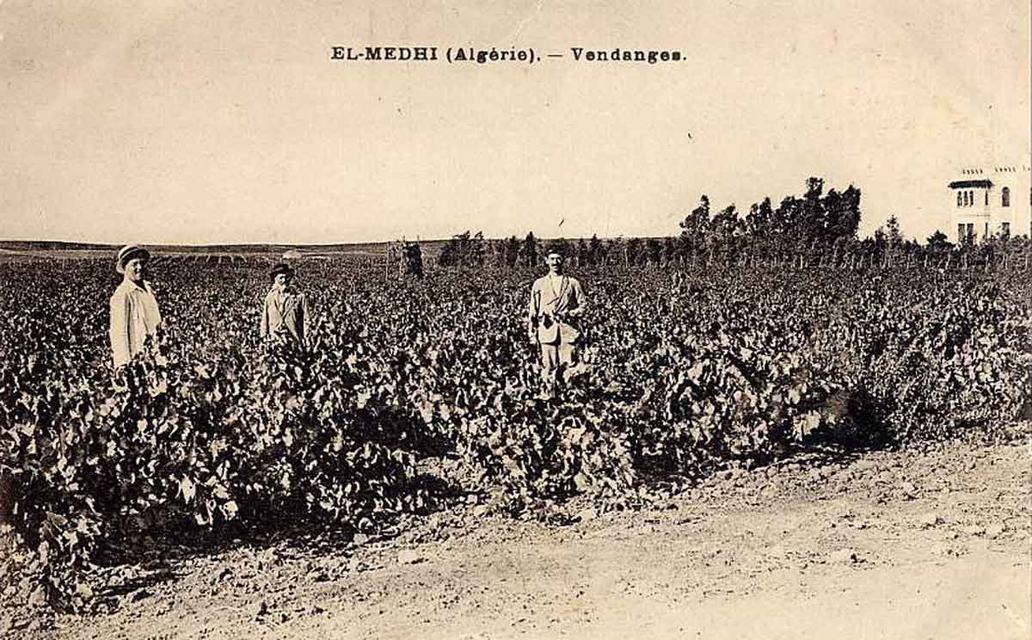 Vendanges au début du XXe s à El-Medhi